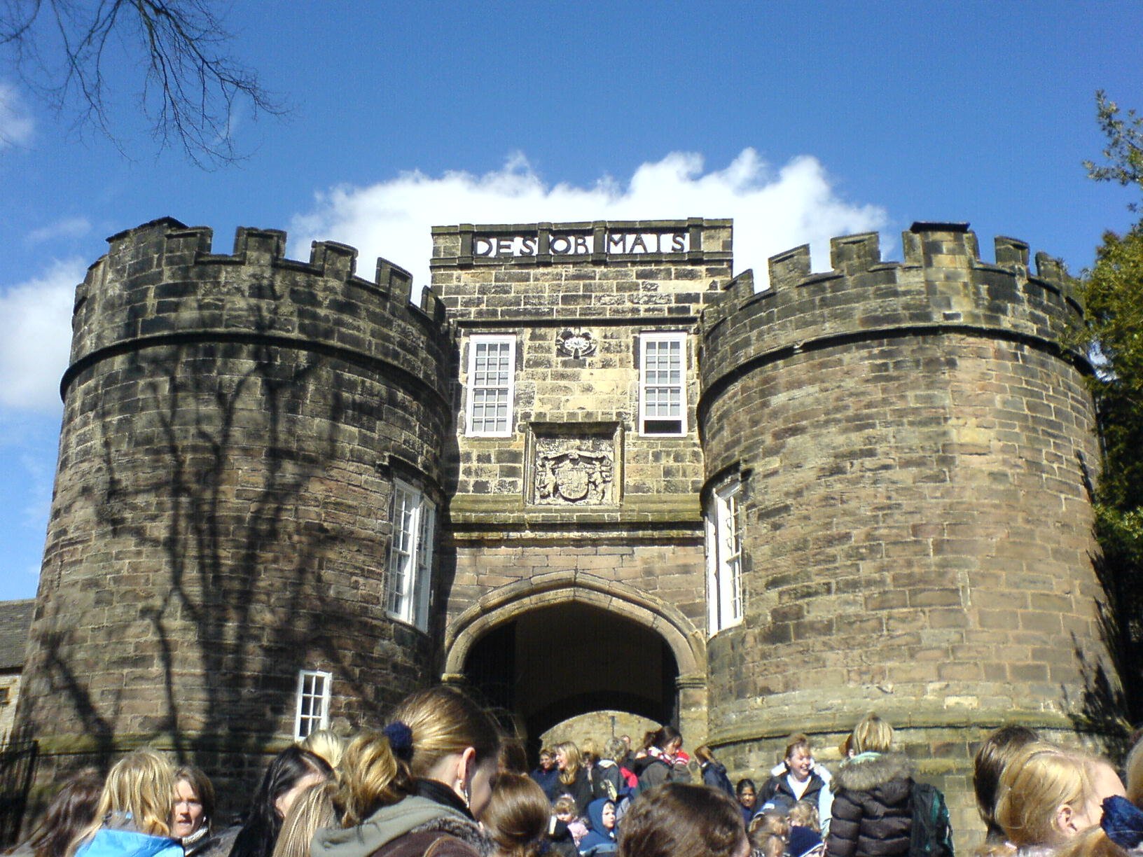 Eingang des Skipton Castle